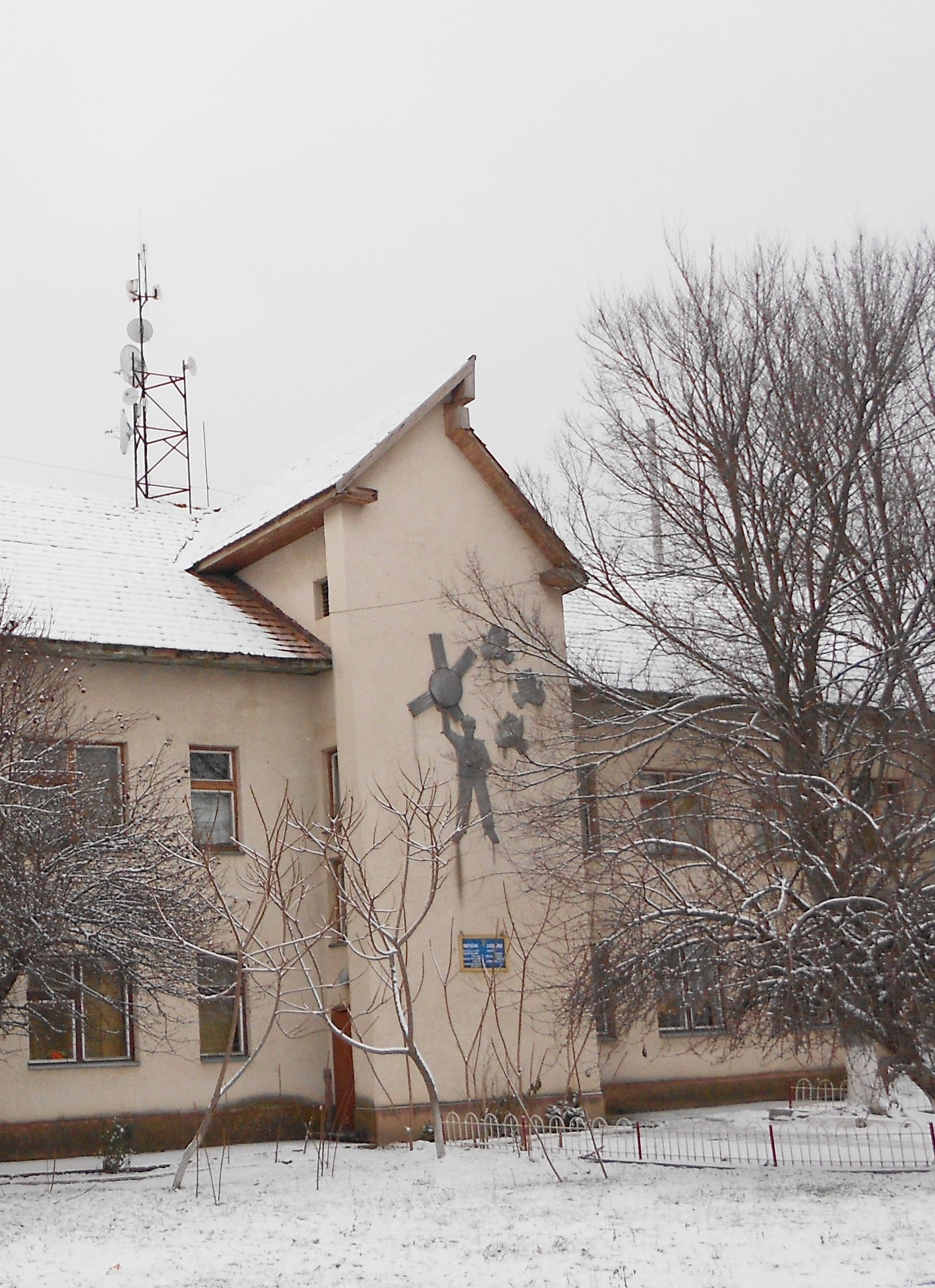 Школа в с. Оросієво